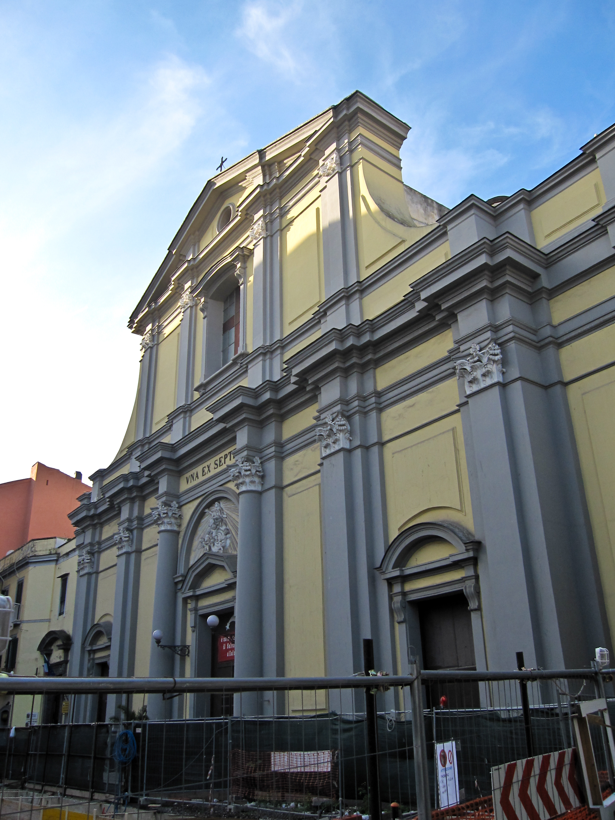 La facciata sulla piazza omonima Napoli - Chiesa di Santa Maria degli Angeli a Pizzofalcone